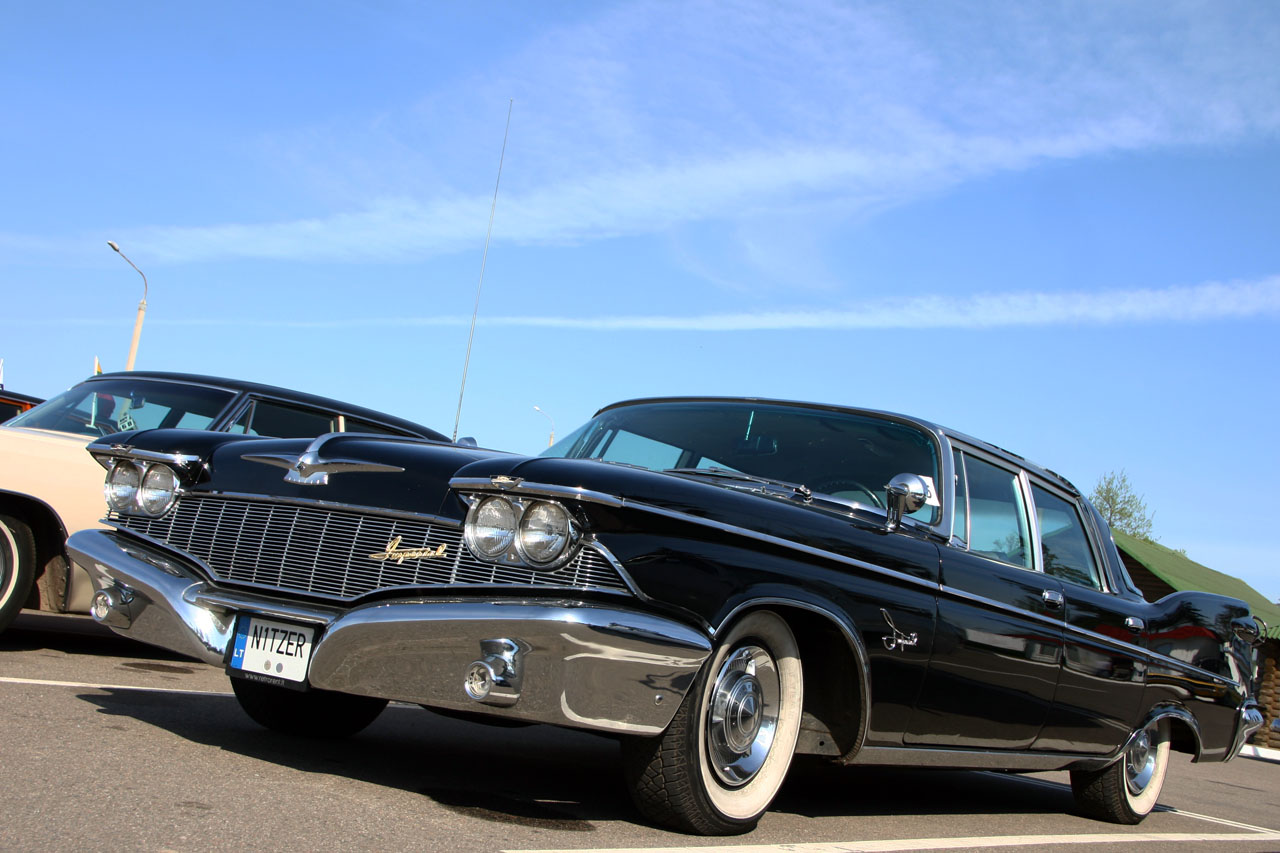 Chrysler Imperial на слете Ретро-Минск 2013